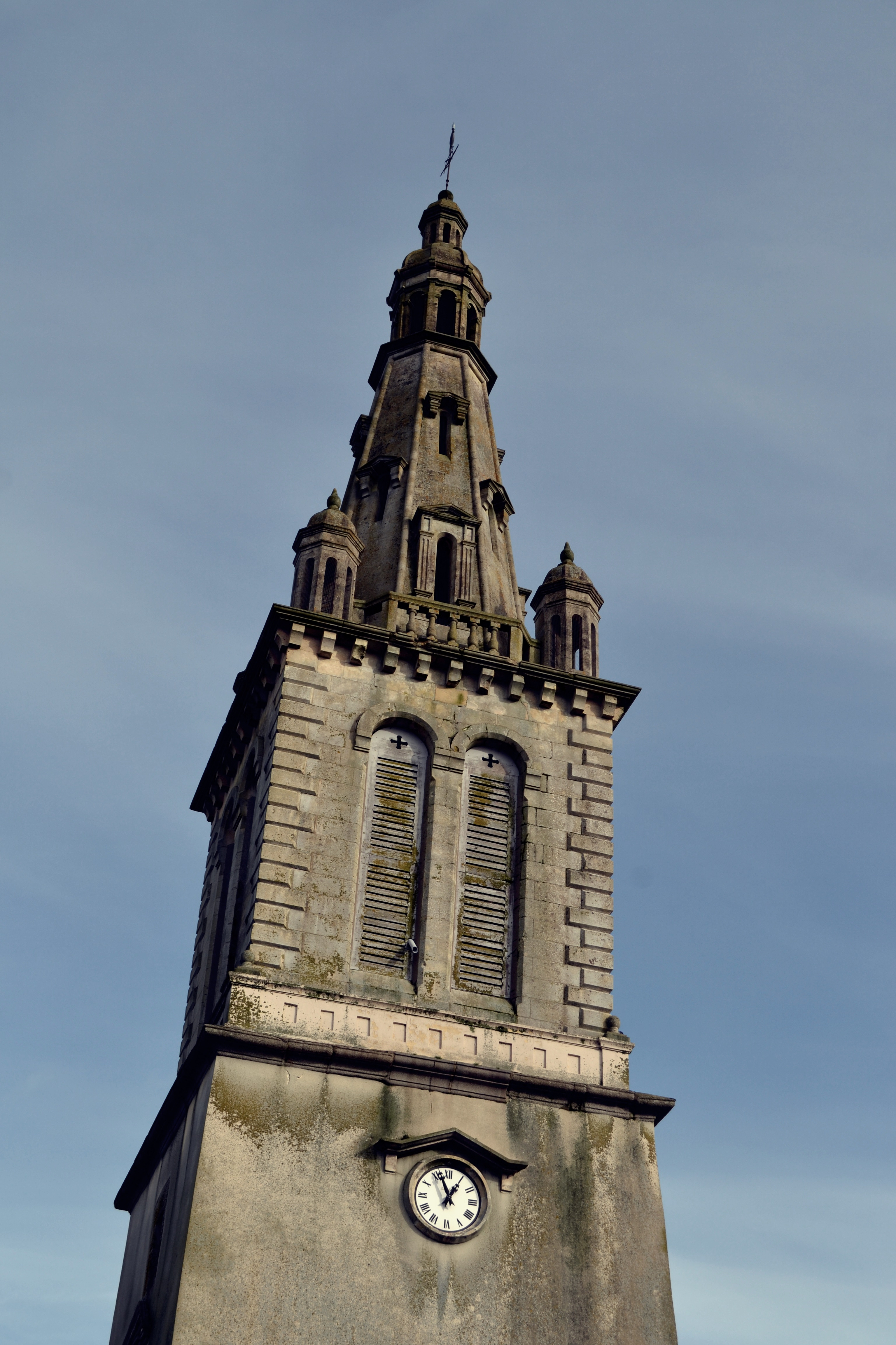 Clocher de l'église saint juste à Trévé (22600) .